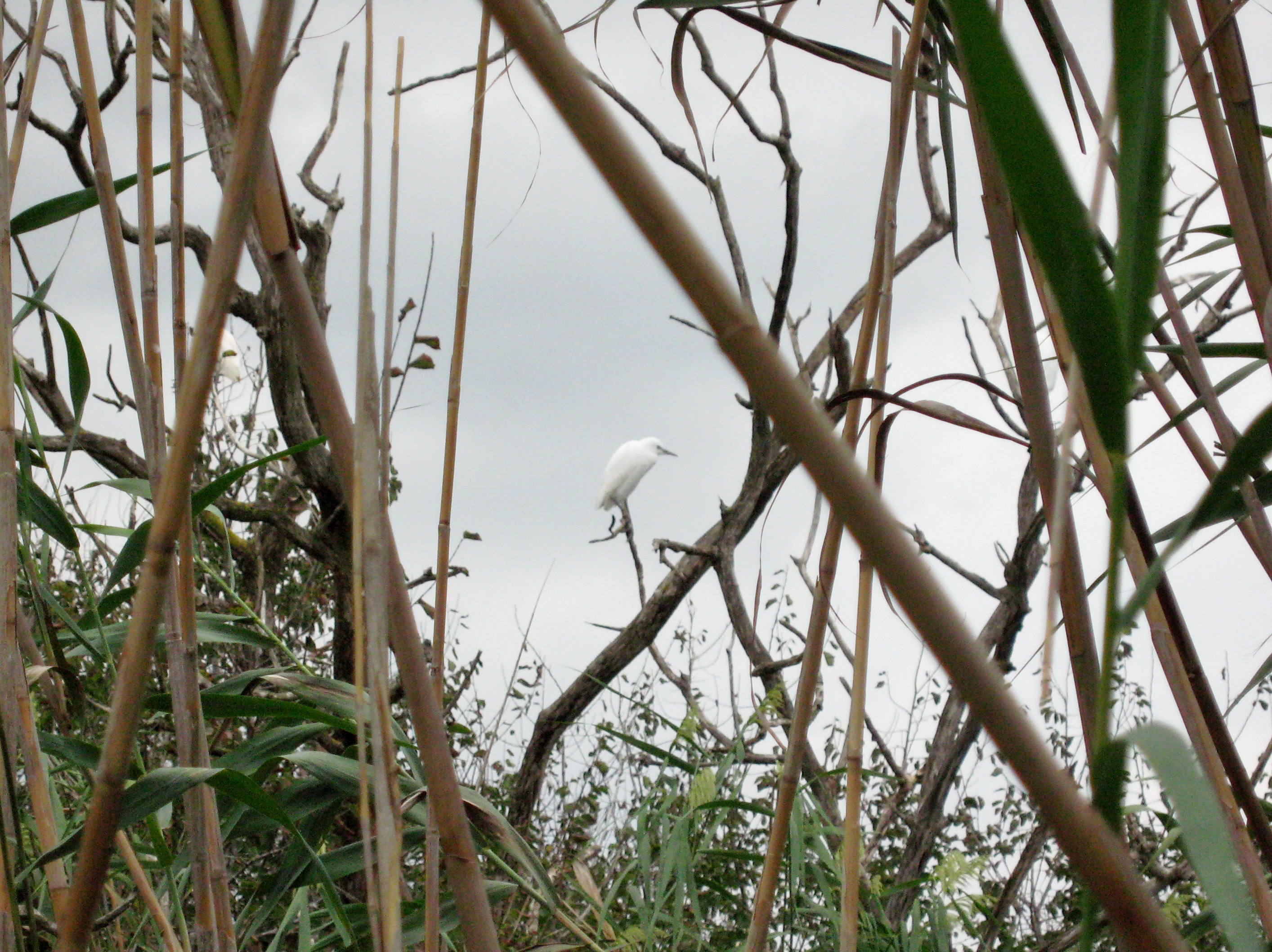 Seidenreiher (Egretta garzetta) im Parc natural de s’Albufera de Mallorca, Gemeinde Muro, Mallorca, Spanien